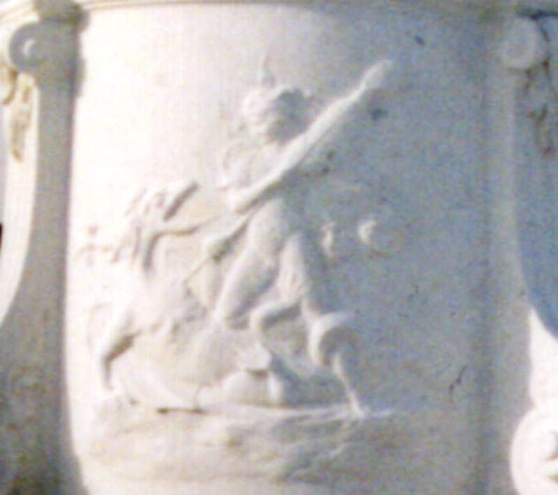 Heinrich-Heine-Denkmal in der Bronx, New York, Detail